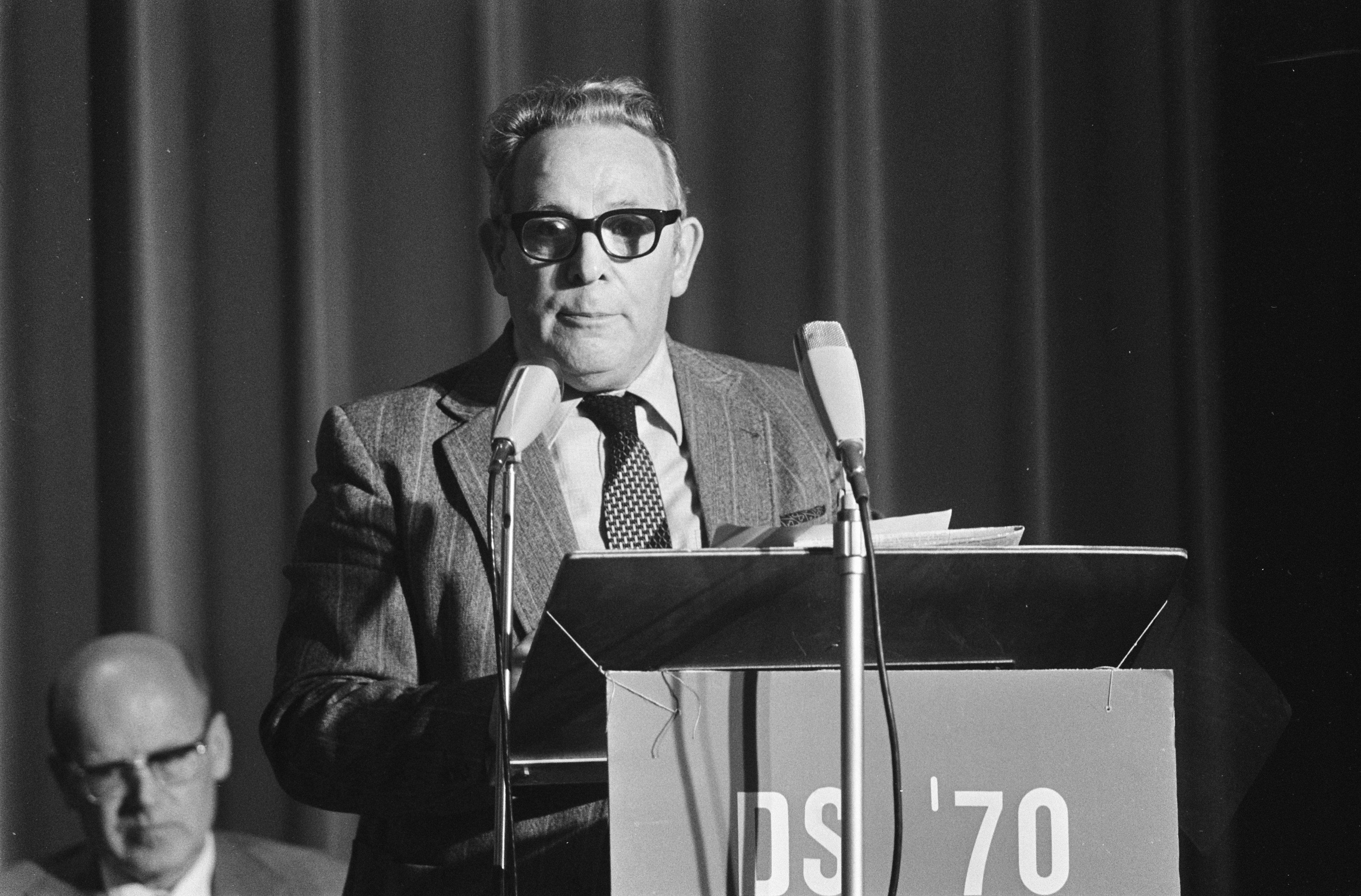 Collectie / Archief : Fotocollectie Anefo Reportage / Serie : [ onbekend ] Beschrijving : Nieuwe voorzitter DS'70 gekozen in Gouda Datum : 19 april 1975 Trefwoorden : partijvoorzitters, voorzitters Persoonsnaam : H. Staneke Instellingsnaam : DS'70 Fotograaf : Peters, Hans / Anefo Auteursrechthebbende : Nationaal Archief Materiaalsoort : Negatief (zwart/wit) Nummer archiefinventaris : bekijk toegang 2.24.01.05 Bestanddeelnummer : 927-8802